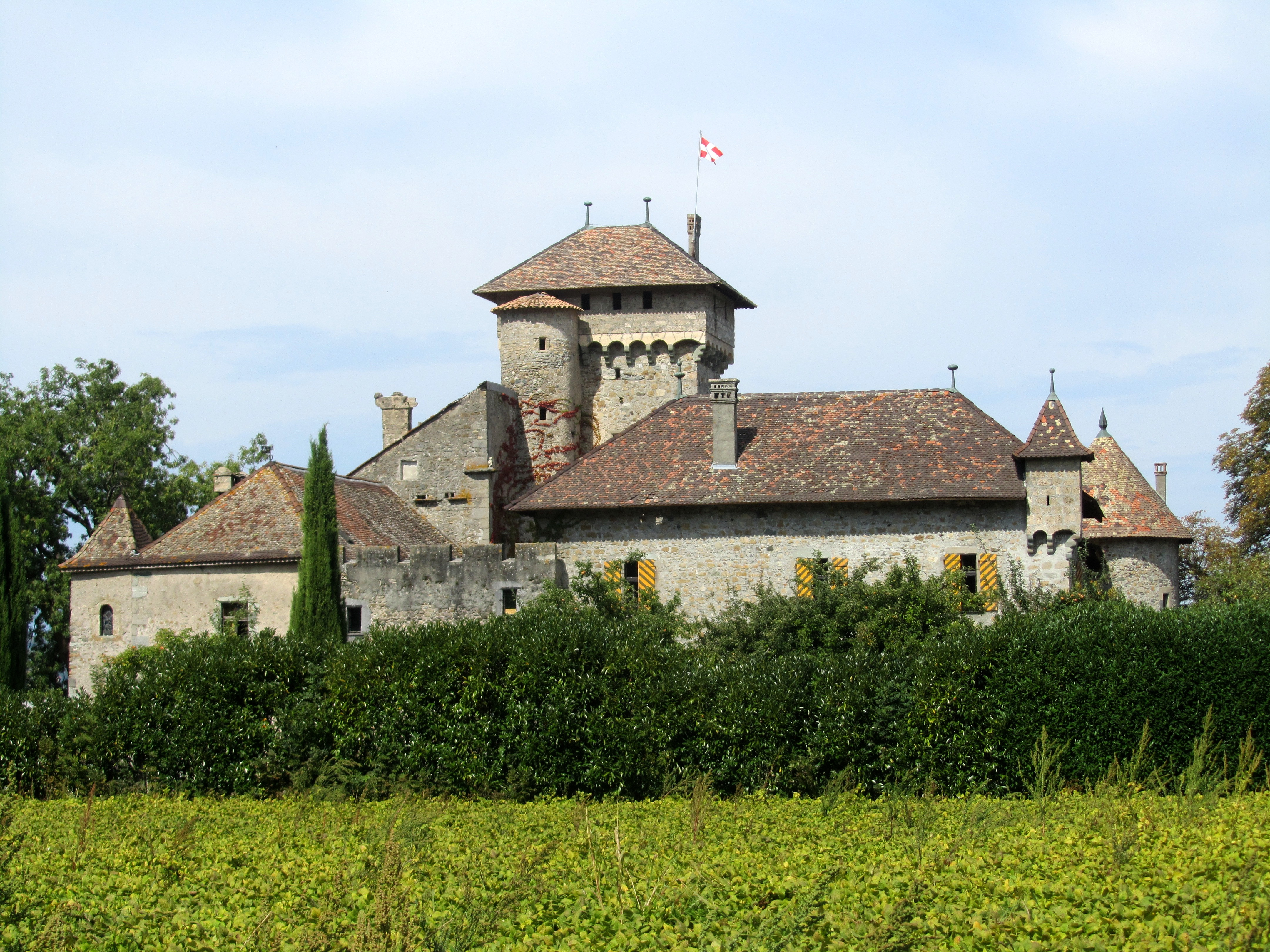 le Château d'Avully, situé à Brenthonne (Haute-Savoie)